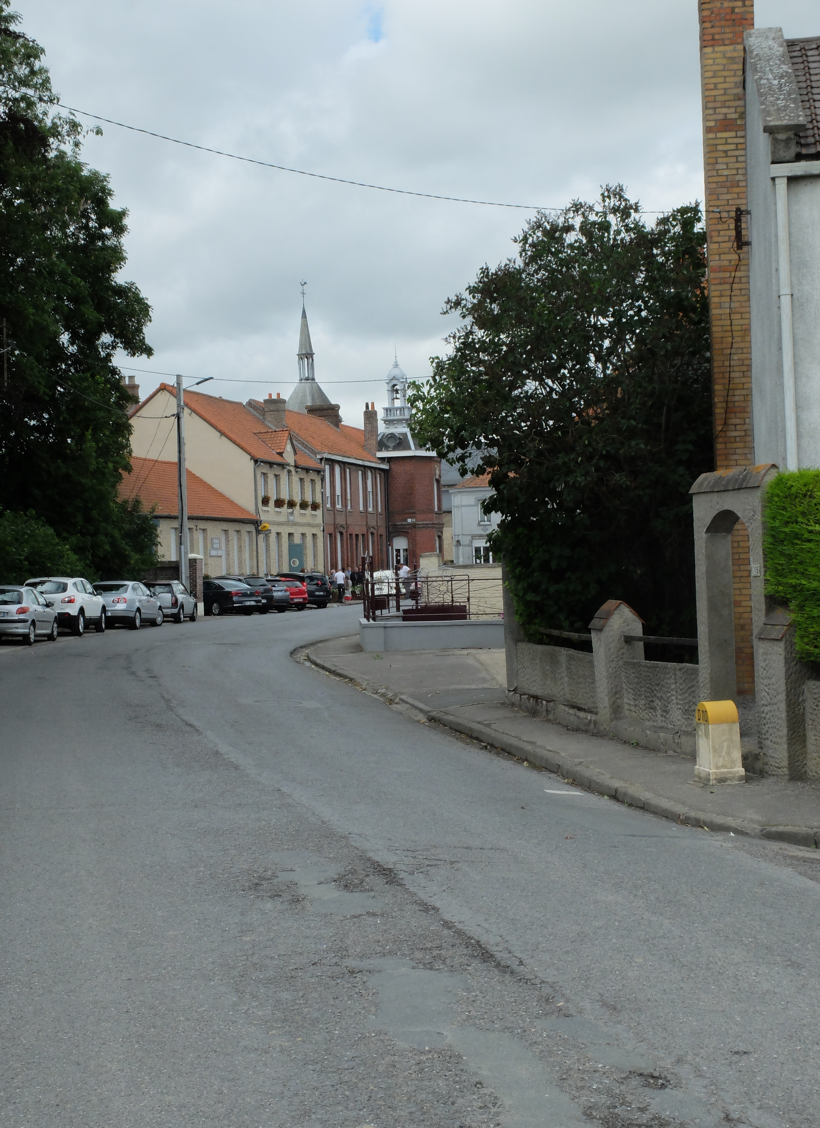 Vue de la rue de la gare de Saint-Pierre-Brouck. Au fond : la mairie et la poste.